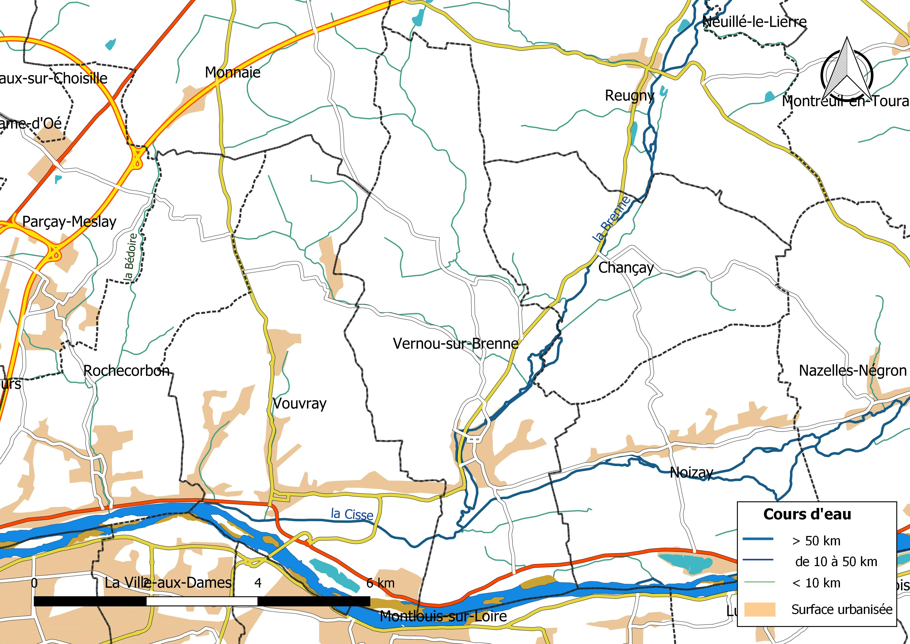 Carte du réseau hydrographique de la commune de Vernou-sur-Brenne (France).